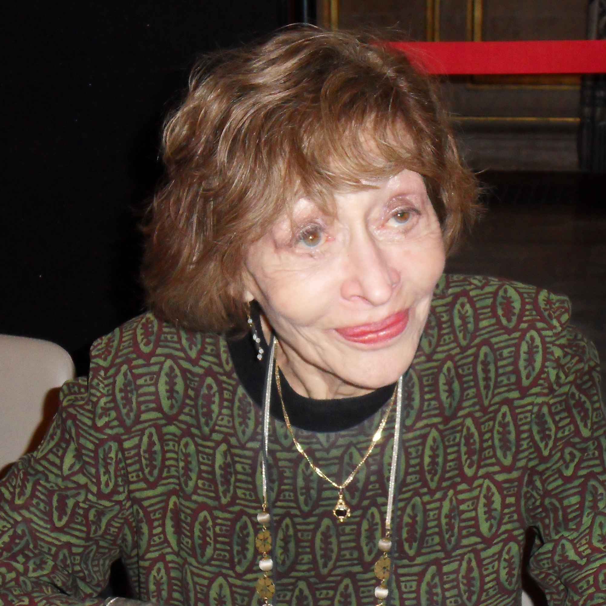 Maghreb des Livres, 11 février 2012 Alice Cherki, Maghreb des Livres 2012